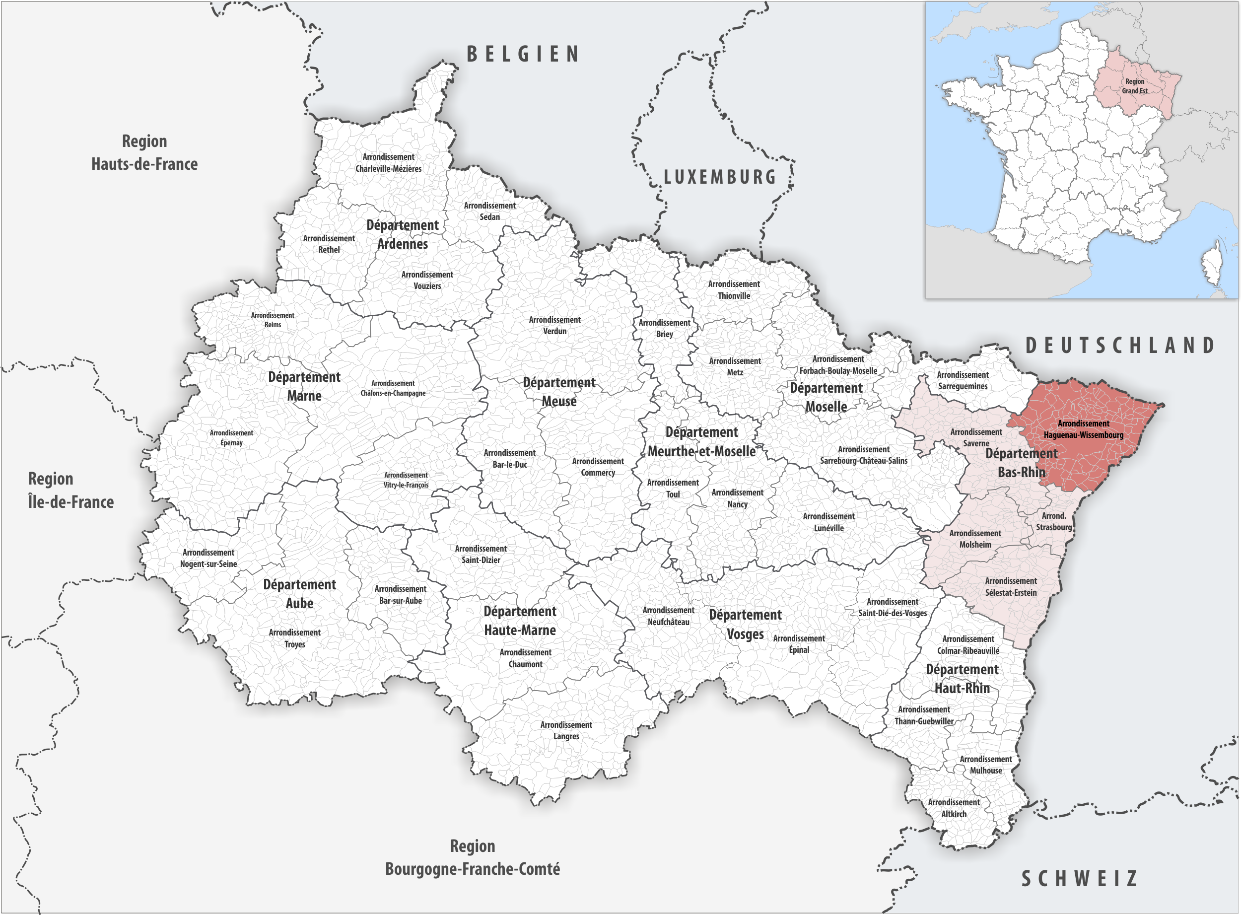 Lage des Arrondissements Haguenau-Wissembourg